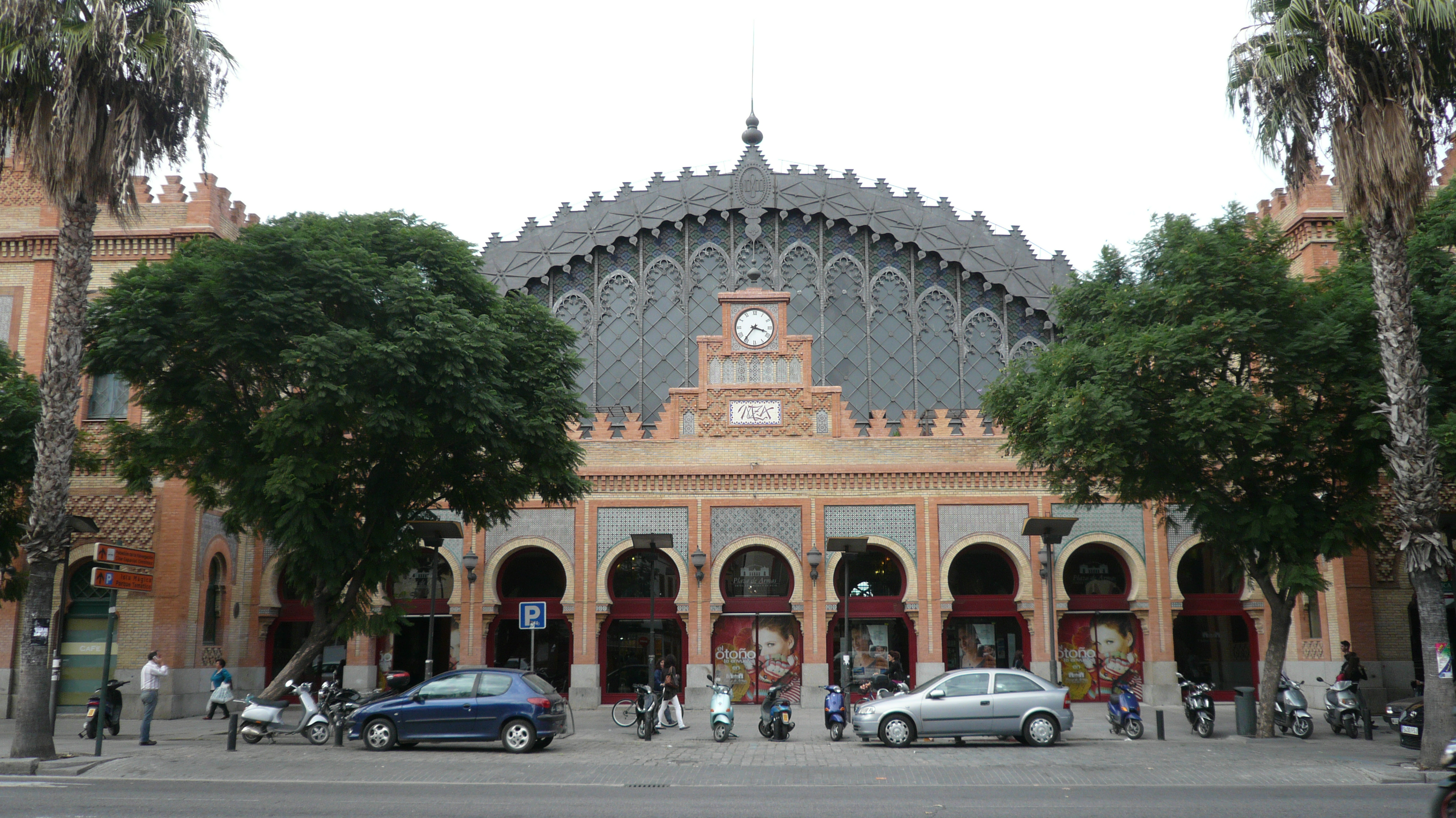 Fachada de la antigua estación de Sevilla-Plaza de Armas.